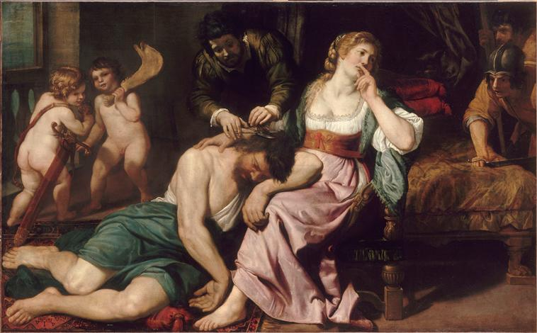 Sansón y Dalilaelabel QS:Les,"Sansón y Dalilae"